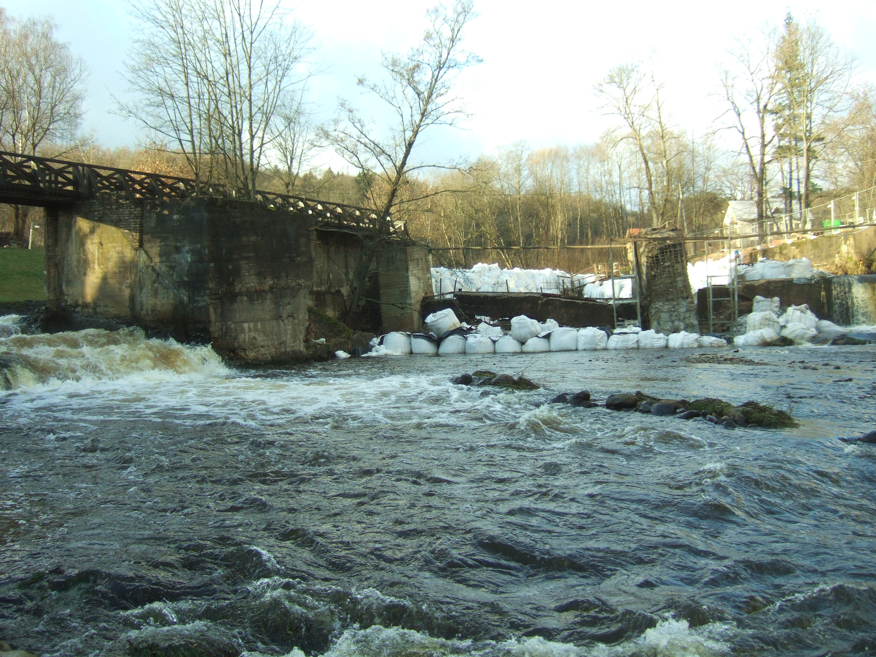 Belmonto užtvanka